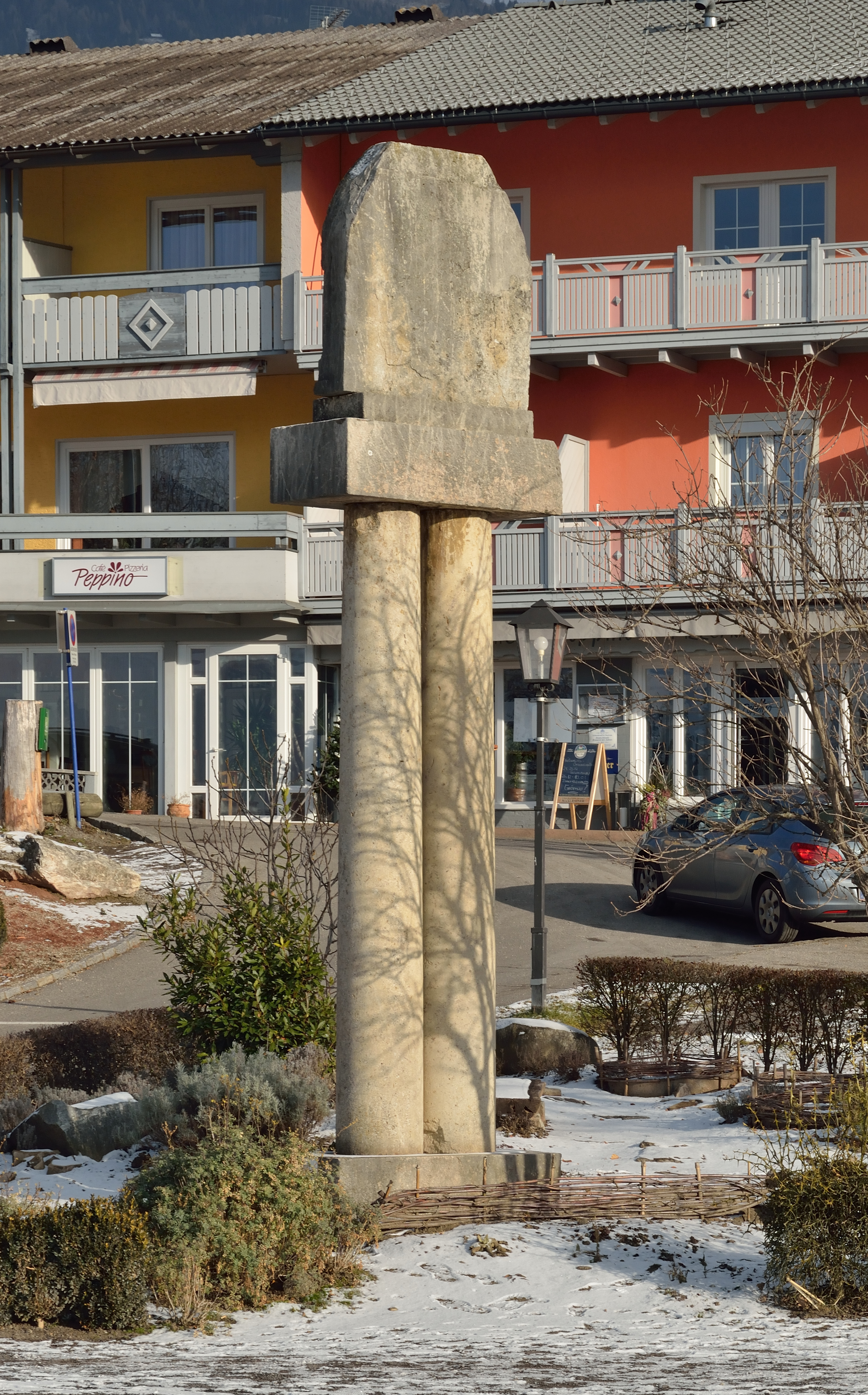 Skulptur Moses von Karl Steiner aus Wien. In Millstatt.